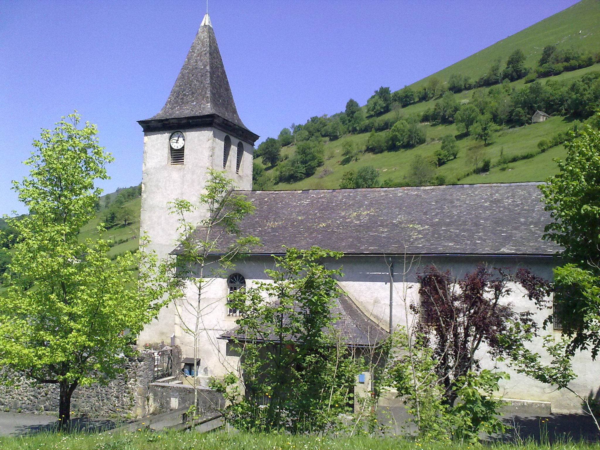 Lourdios-Ichère, France, le 23 mai 2010.